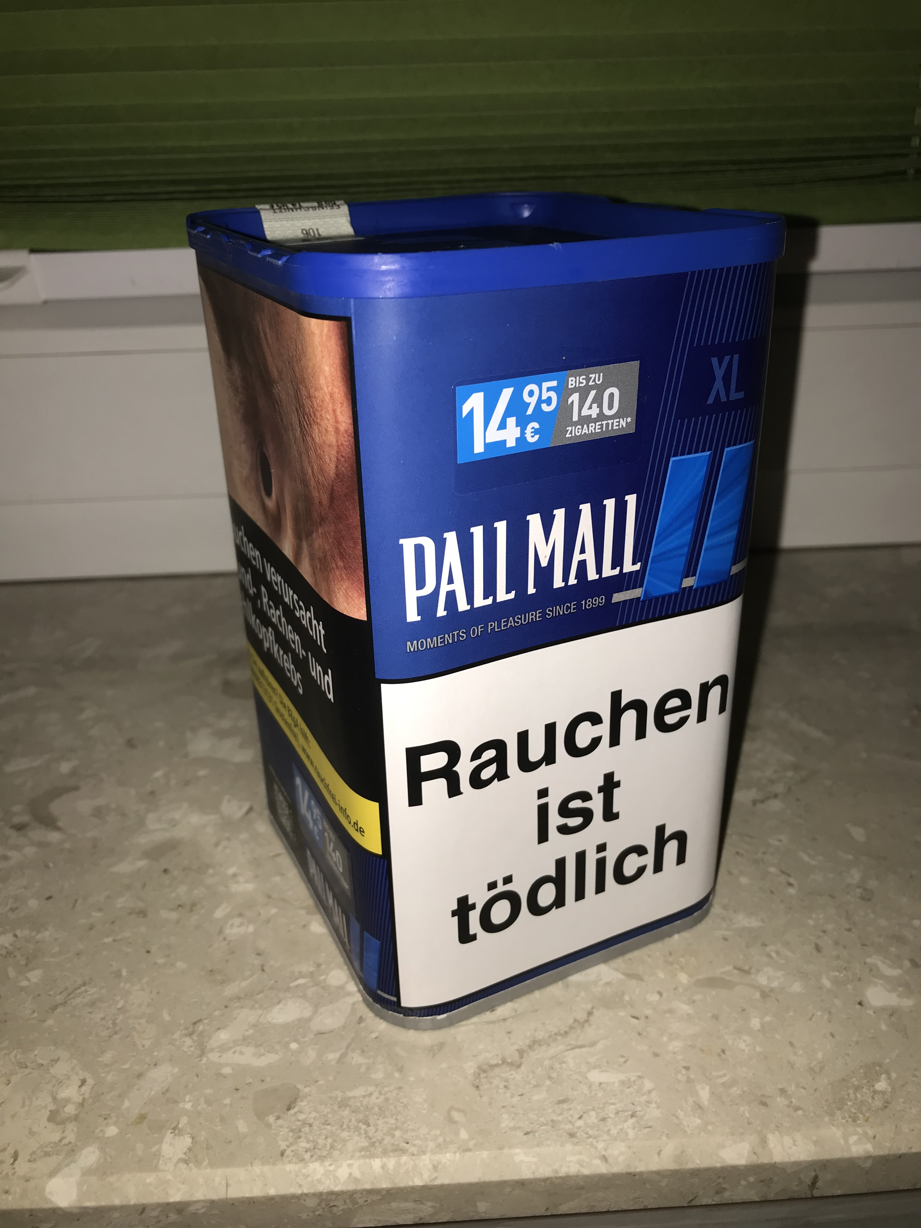 Eine 60g Dose Pall Mall Blue Tabak für 14,95€